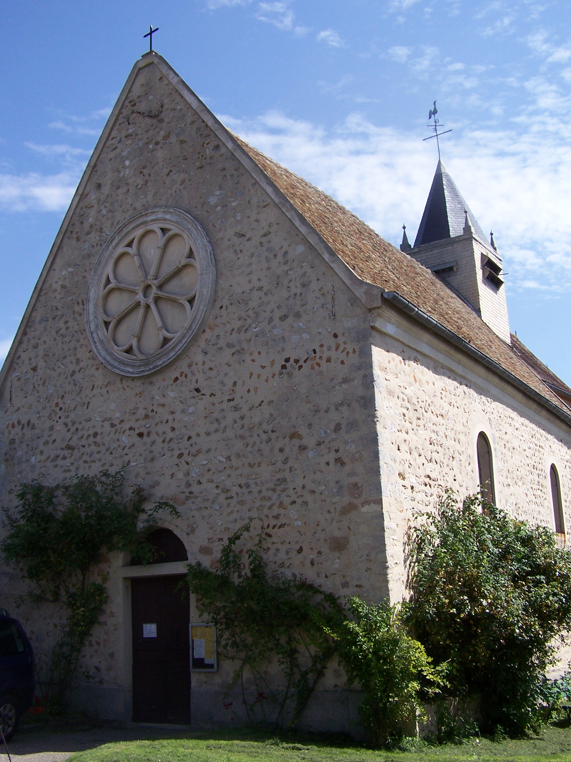 Église d'Herbeville (Yvelines, France). Photo personnelle. Church of Herbeville (Yvelines, France). Personal photo. Auteur/author: ℍenry Salomé